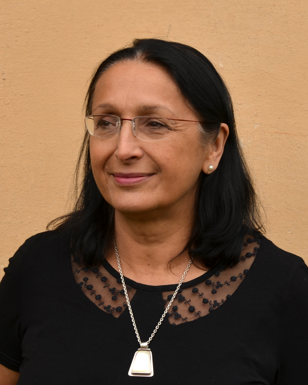 Hana Papežová (2016)